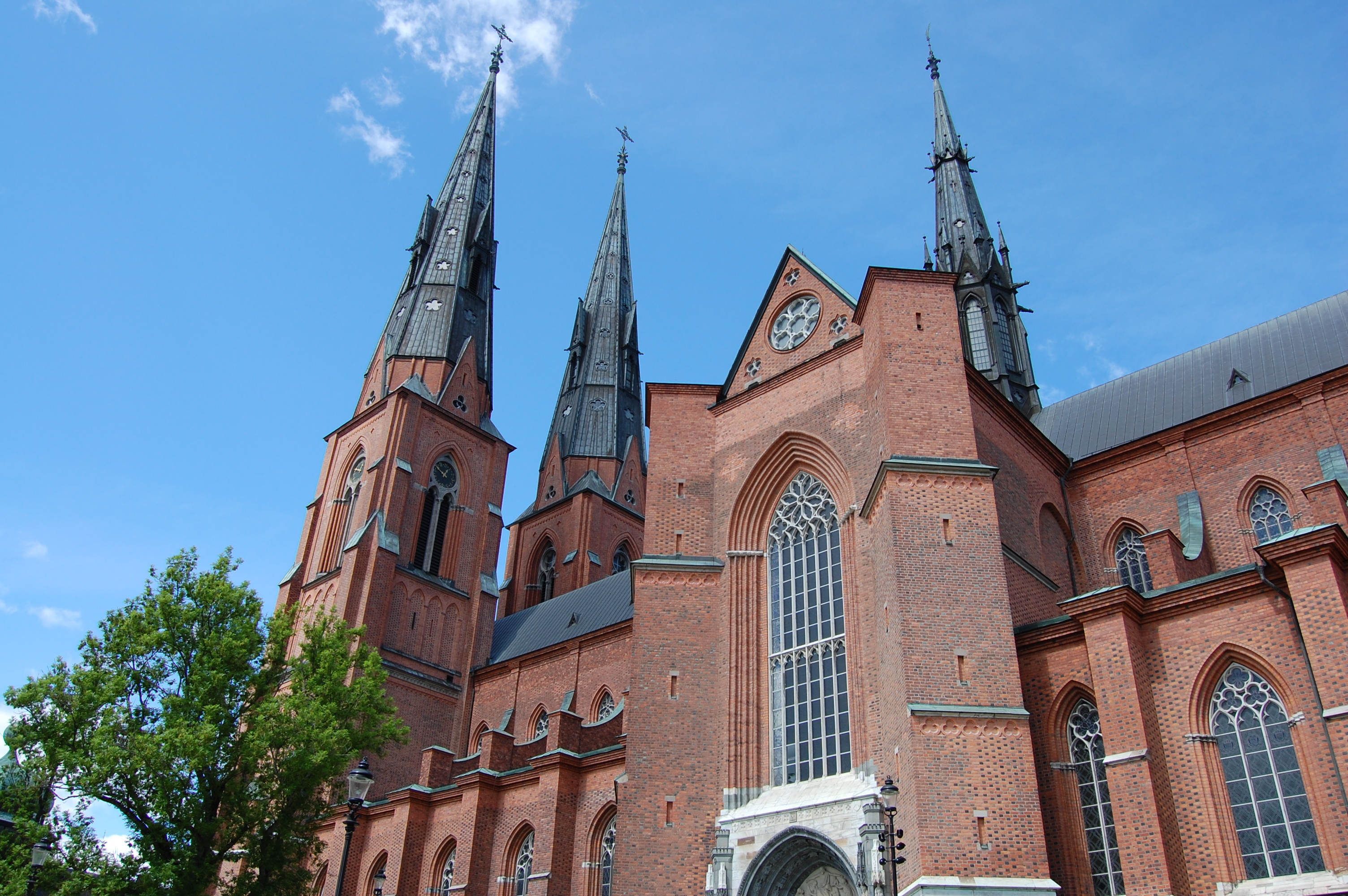 Uppsala domkyrka från Biskopsgatan.